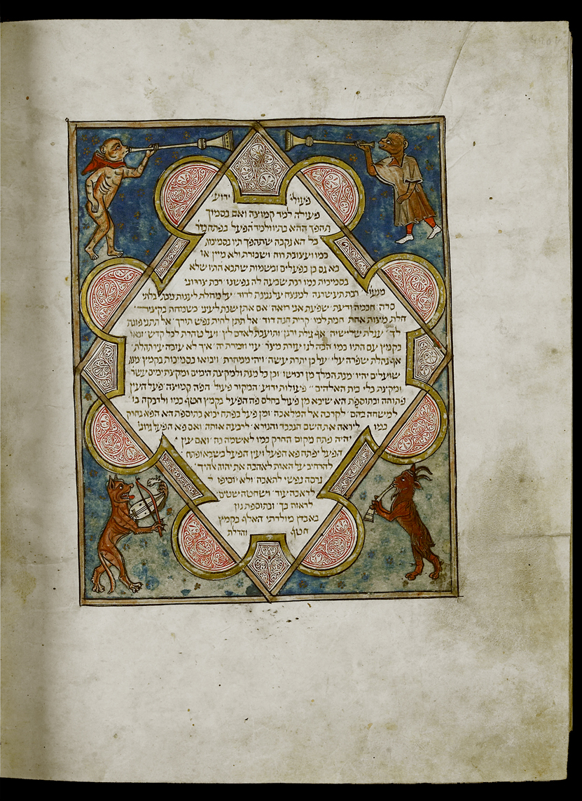 Bíblia de Cervera (fl 440v)